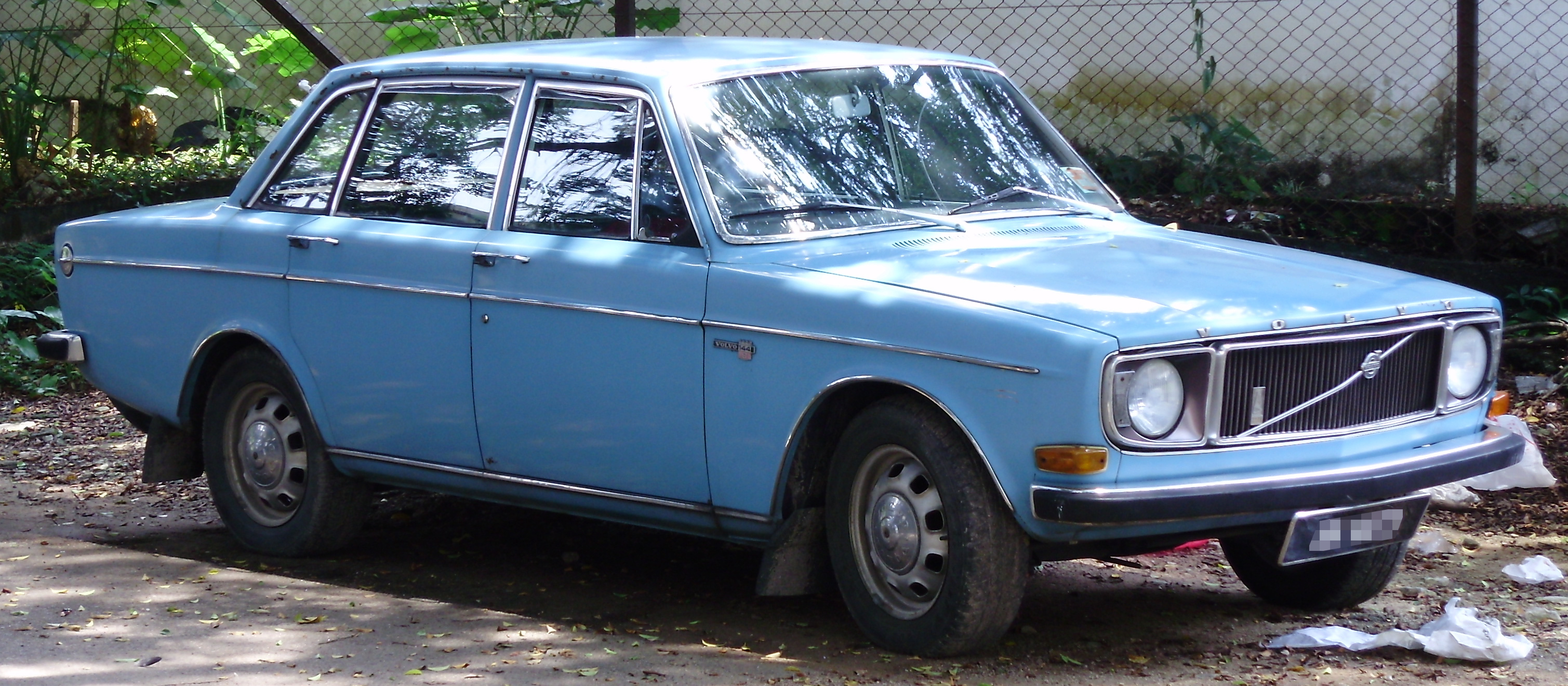 Front quarter view of a Volvo 144 (de Luxe) in Pudu, Kuala Lumpur, Malaysia.